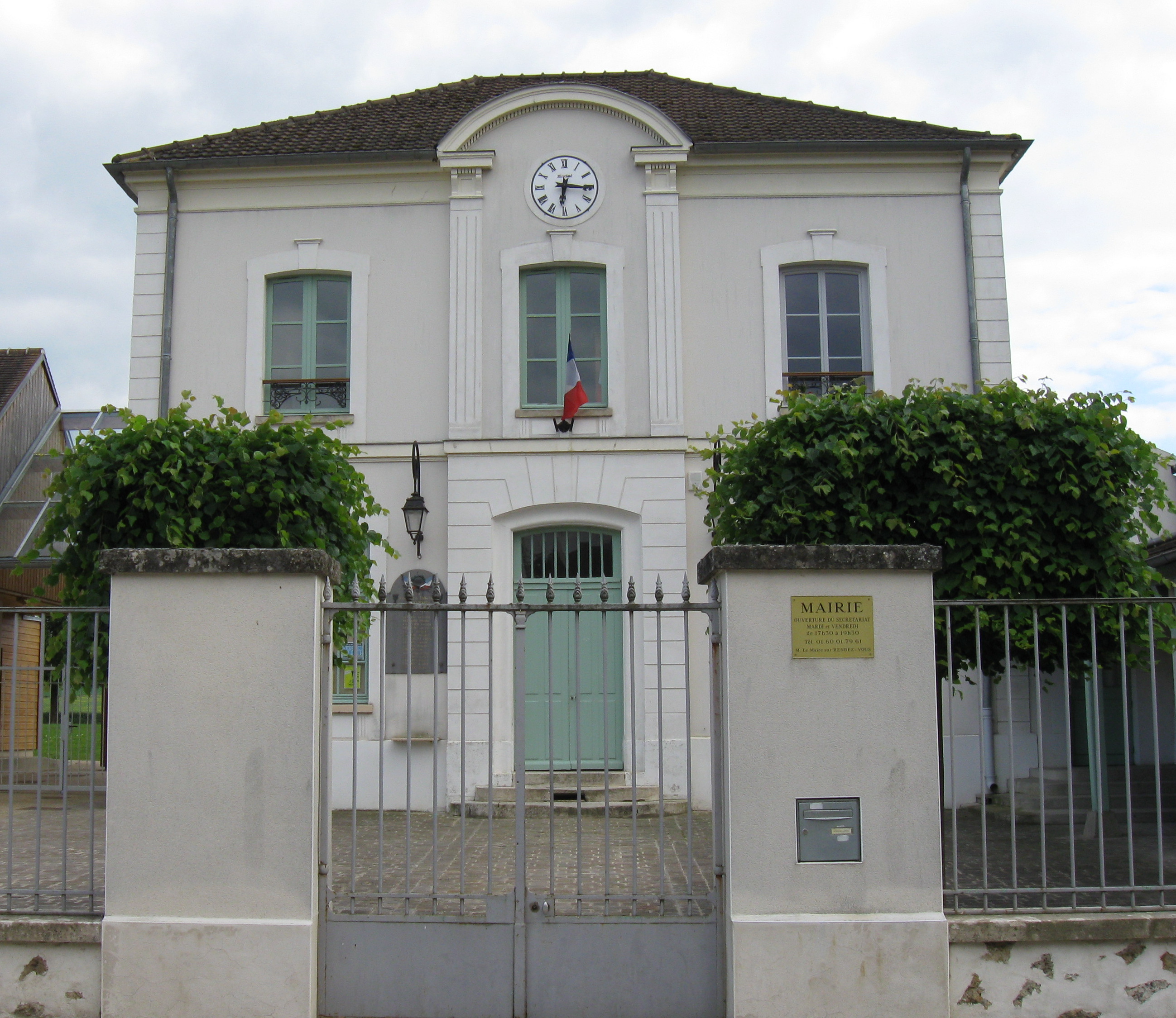 Mairie de Tancrou. (département de la Seine et Marne, région Île-de-France).